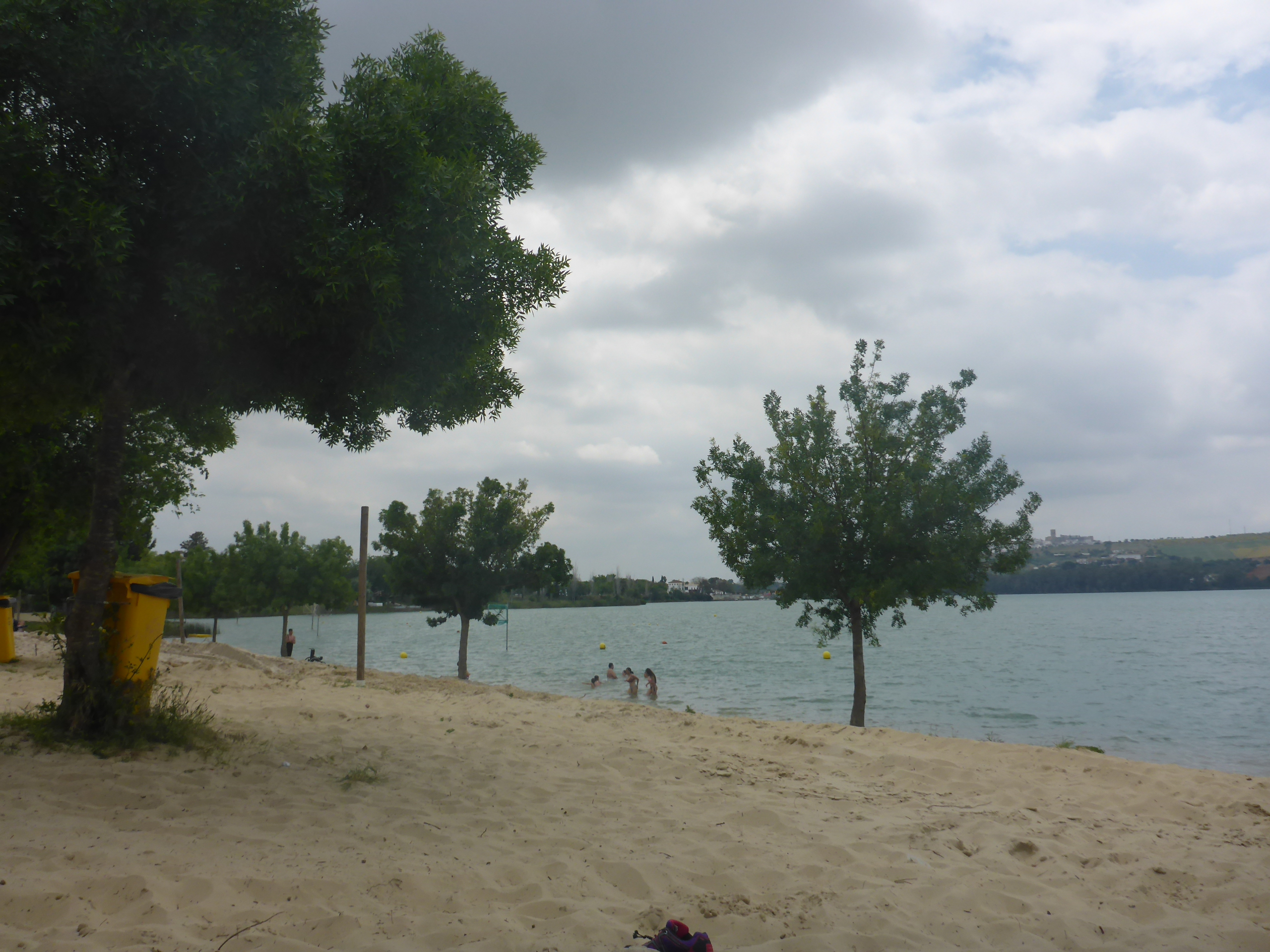 Presa de Arcos de la Frontera (España)